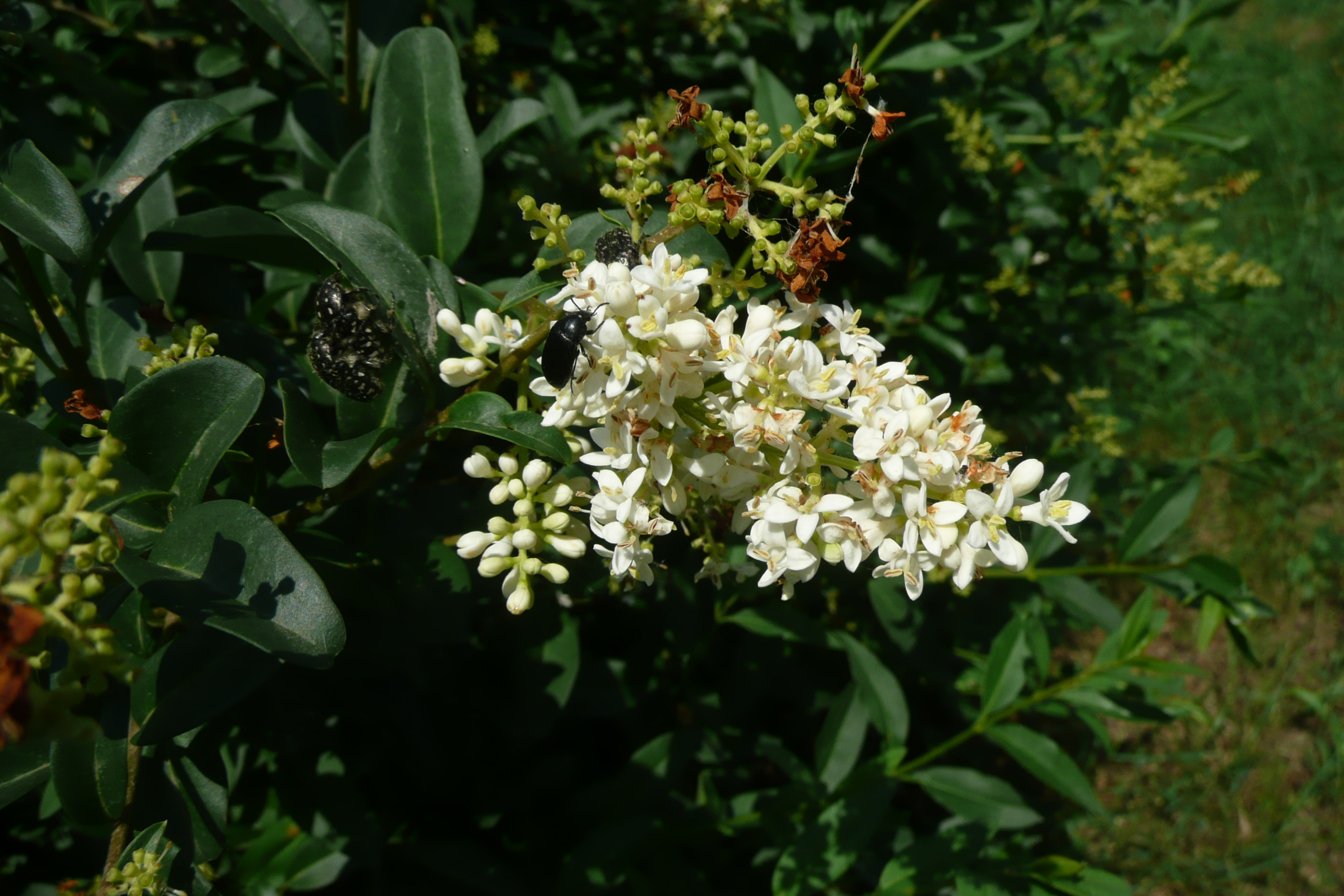 Растение в Седово